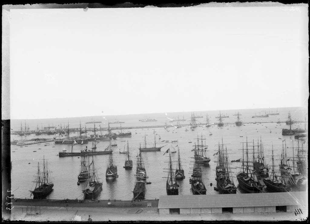 Imatge